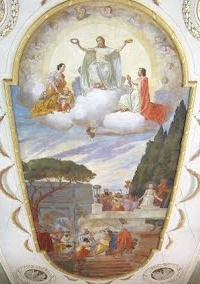 Kaspar Schleibner (1863-1931), Deckengemälde kath. Pfarrkirche Rißtissen